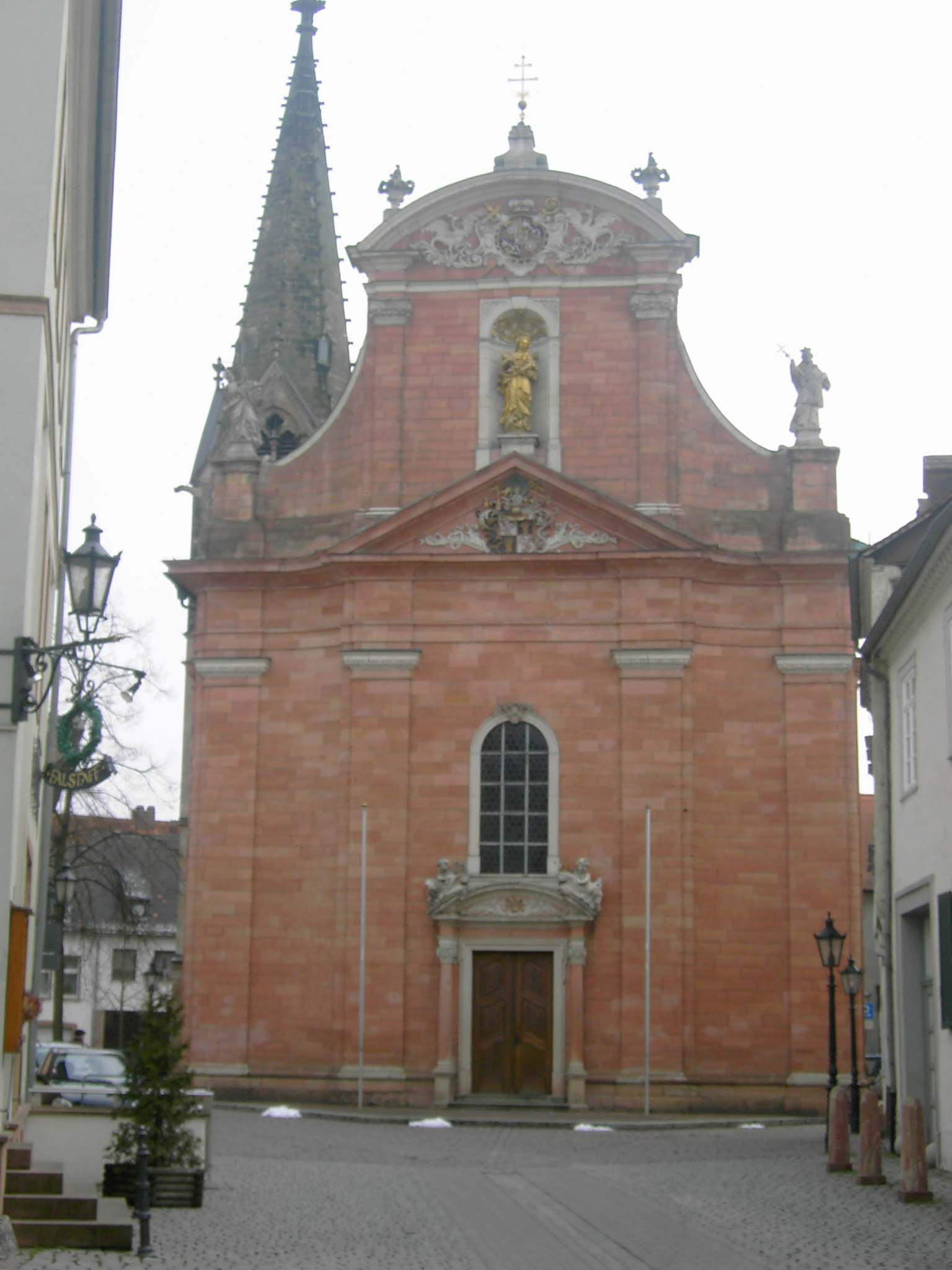 Das Bild zeigt die Muttergottespfarrkirche (Auch: "Zu unserer lieben Frau") in Aschaffenburg. Bis in das Jahr 1183 ist die Existenz der Pfarrei "Zu unserer lieben Frau" in Aschaffenburg nachgewiesen. Zwischen 1768 und 1775 wurde das alte gotische Kirchenschiff durch einen neues barockes Gebäude ersetzt. Die auf dem Bild abgebildete Front wird von dem Wappen gekrönt, welches das des Kurfürsten Emmerich Joseph von Breidbach-Bürresheim (reg. 1763-1774) ist. Des Weiteren wird die Front von einer goldenen Immaculata und dem Wappen des Bauherren Stadelmanns geziert.